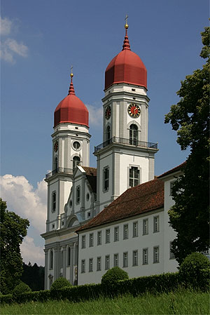 Klosterkirche von Sankt Urban